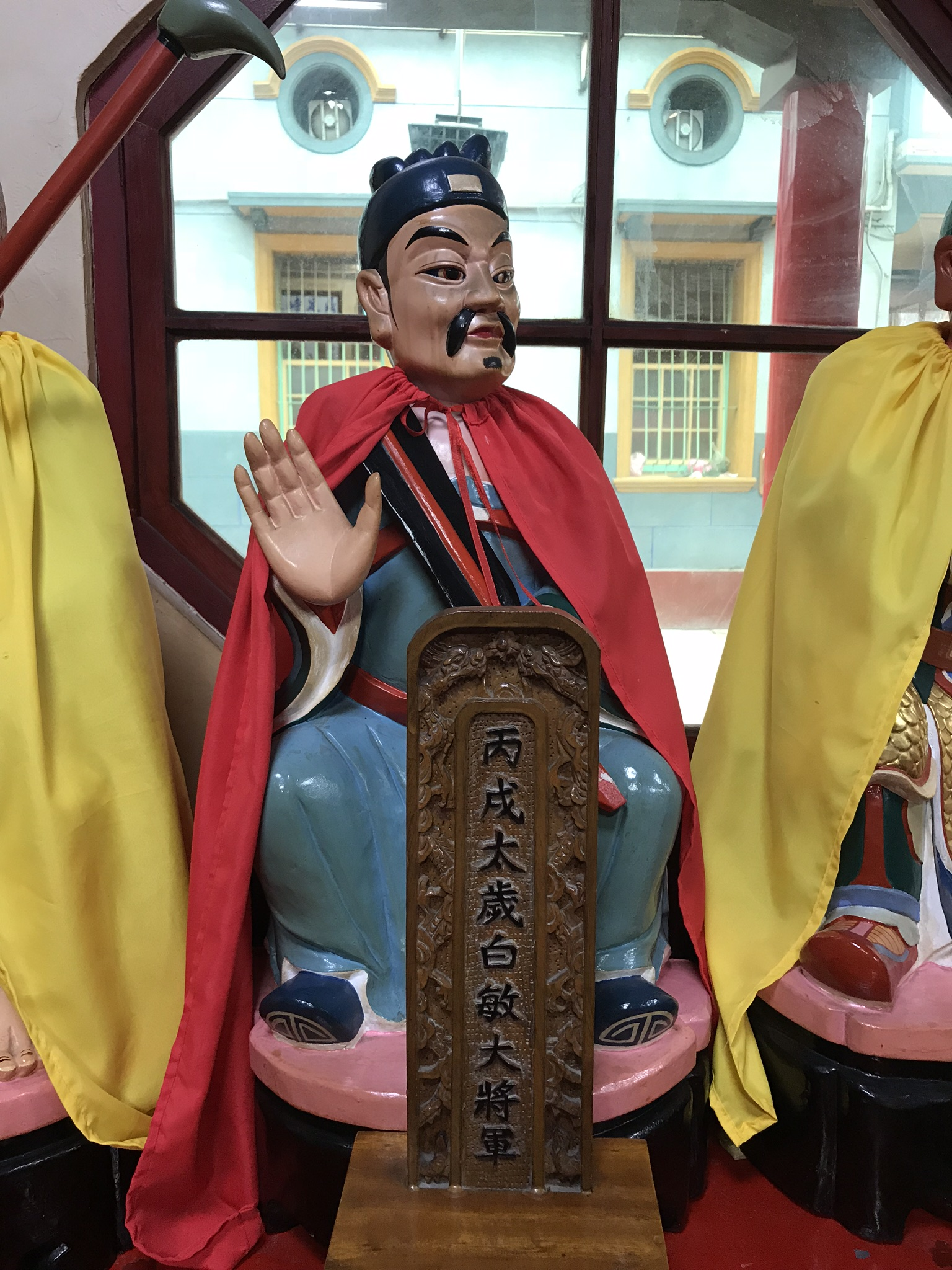 丙戌太歲白敏大將軍神像